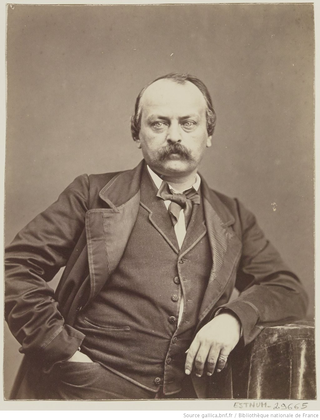 Portrait photographique d'Henri de Kock par Nadar